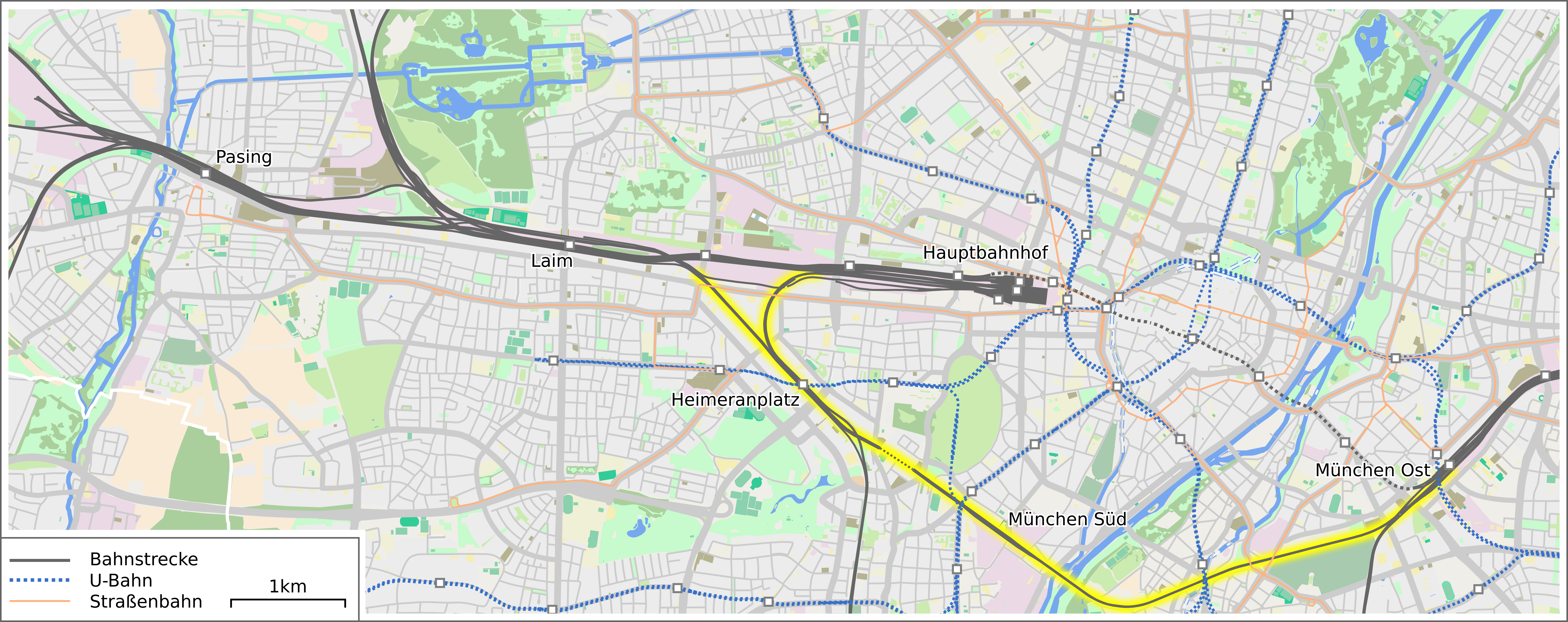 Karte des Münchner Südringes